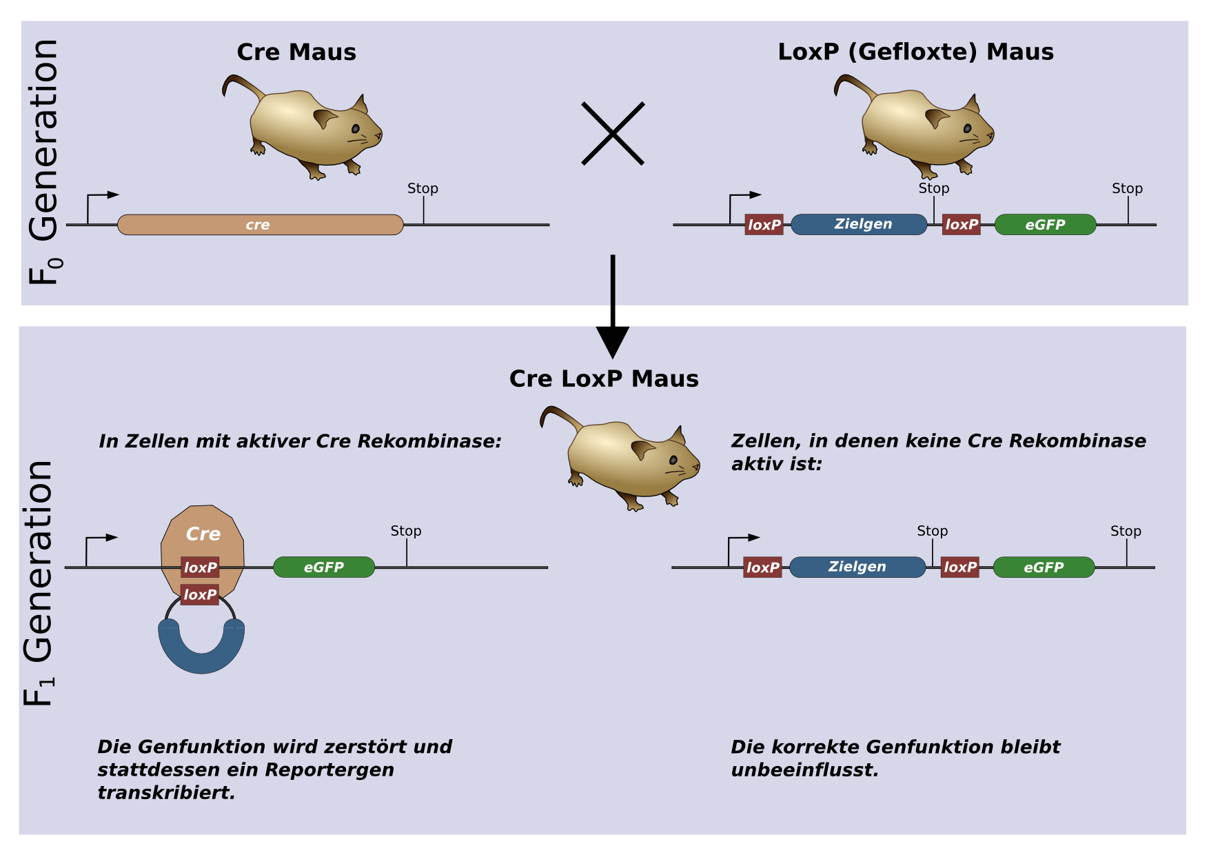 Illustration eines Genetikversuchs, der sich des Cre / LoxP Systems bedient. Die Funktion eines Zielgens wird durch einen konditionalen Knock-out zerstört. Typischerweise würde in einem solchen Experiment ein gewebespezifischer Promotor eingesetzt, um die Expression der Cre-Rekombinase zu steuern. Auch eine zeitliche Steuerung der Aktivität über einen nur zu einem bestimmten Ontogenesestadium aktiven Promotor wäre denkbar.